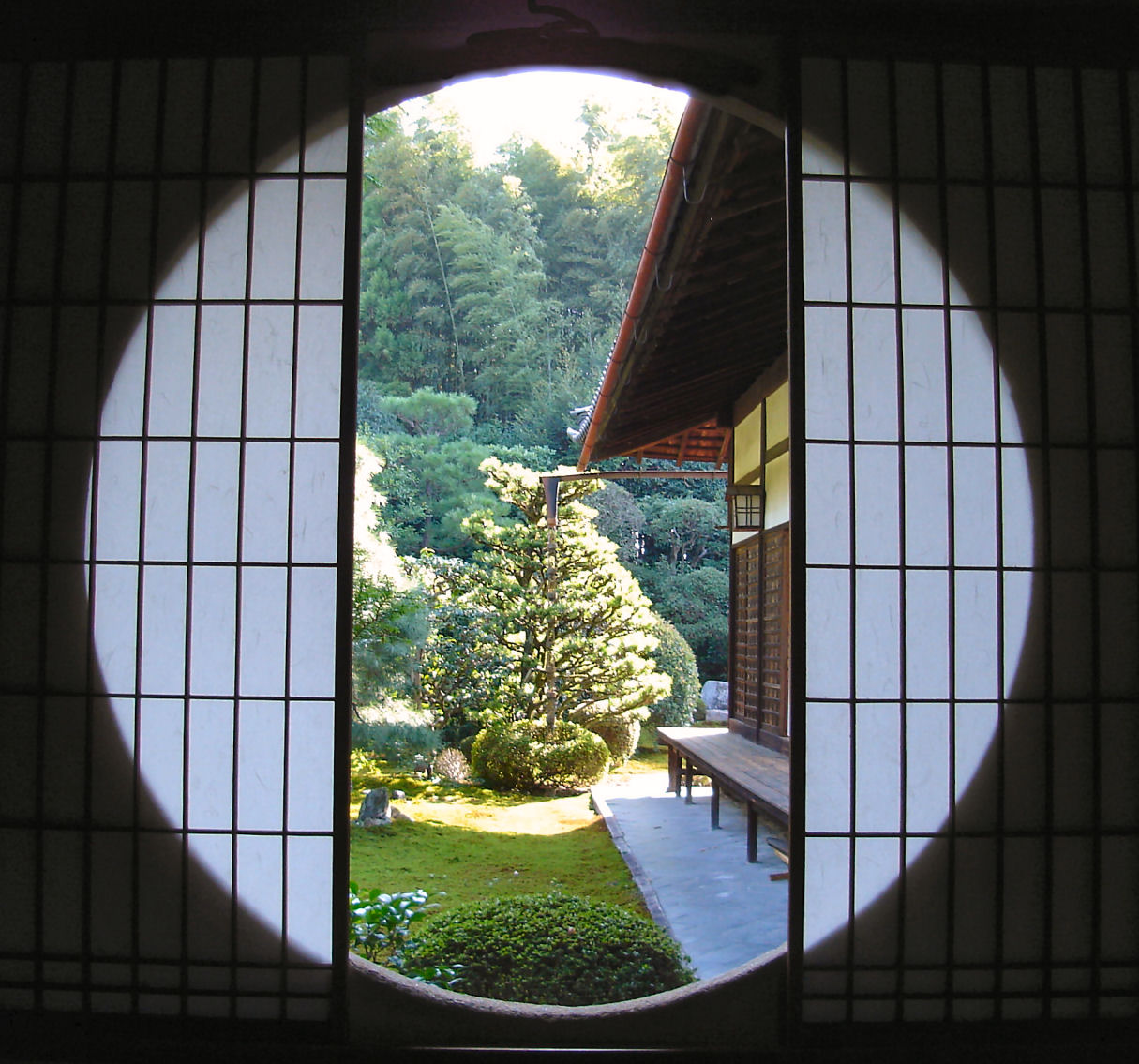 View from Zunantei (Tofuku-ji)